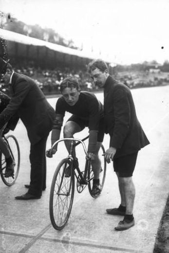 Piard, cycliste